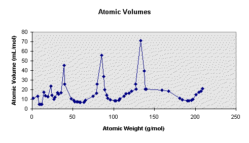 Atoomvolume. Gemaakt met word met bhv gegevens!